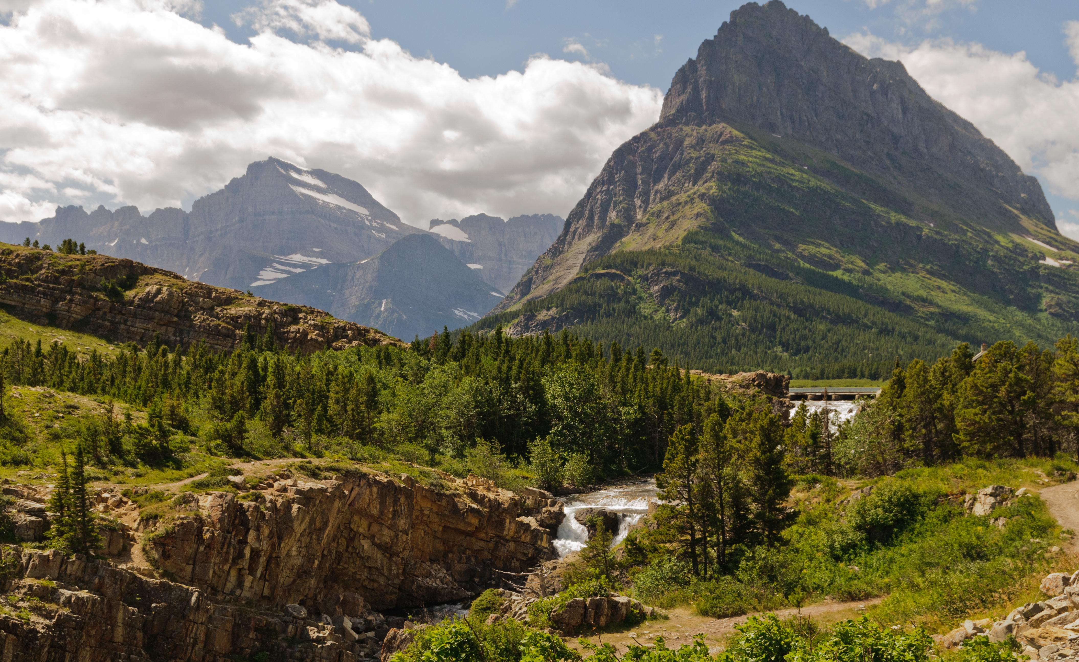 Banff-Glacier-44